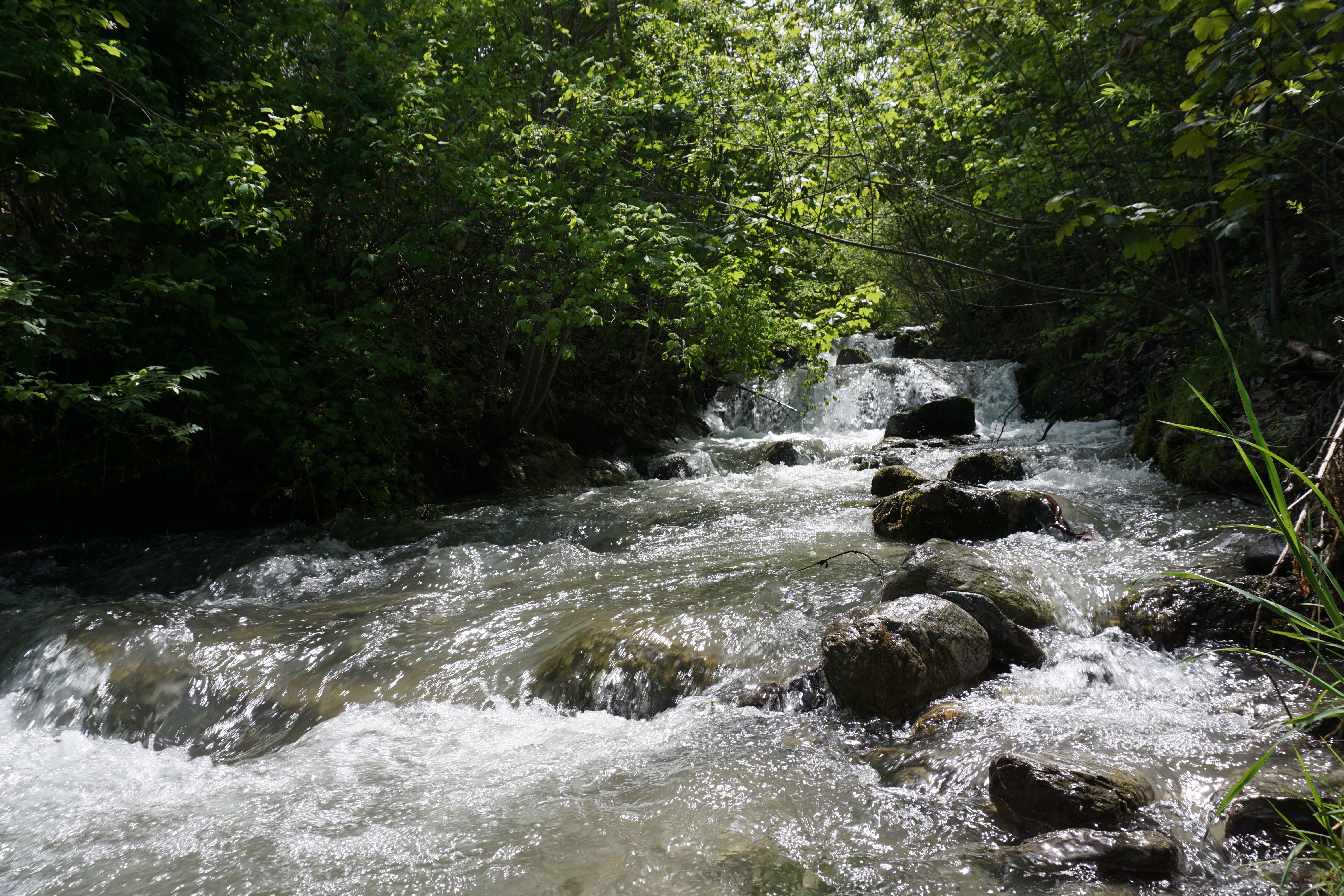 Unverbauter Axamer Bach etwas südlich der Olympiastraße